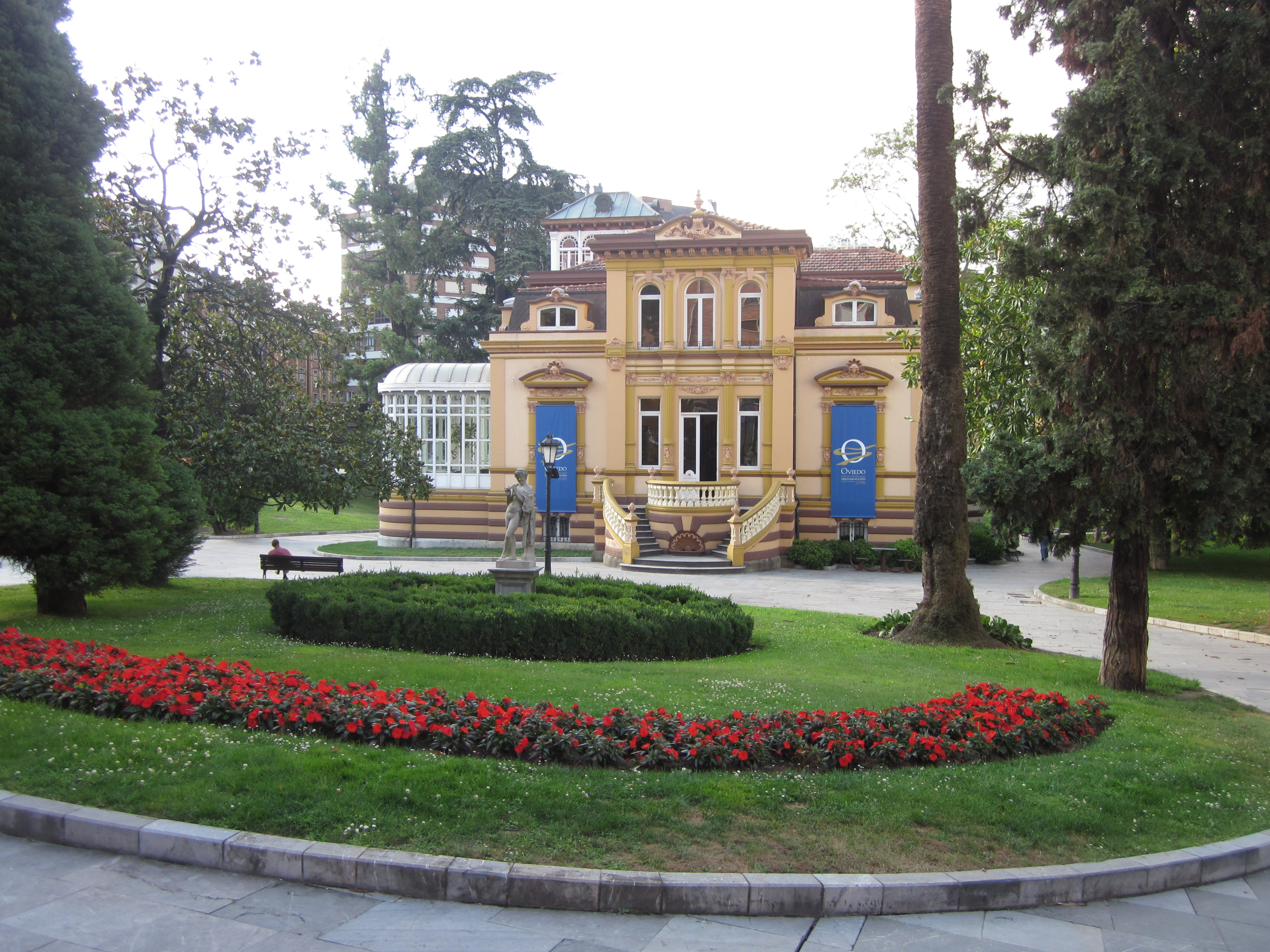 Villa Magdalena. Oviedo.